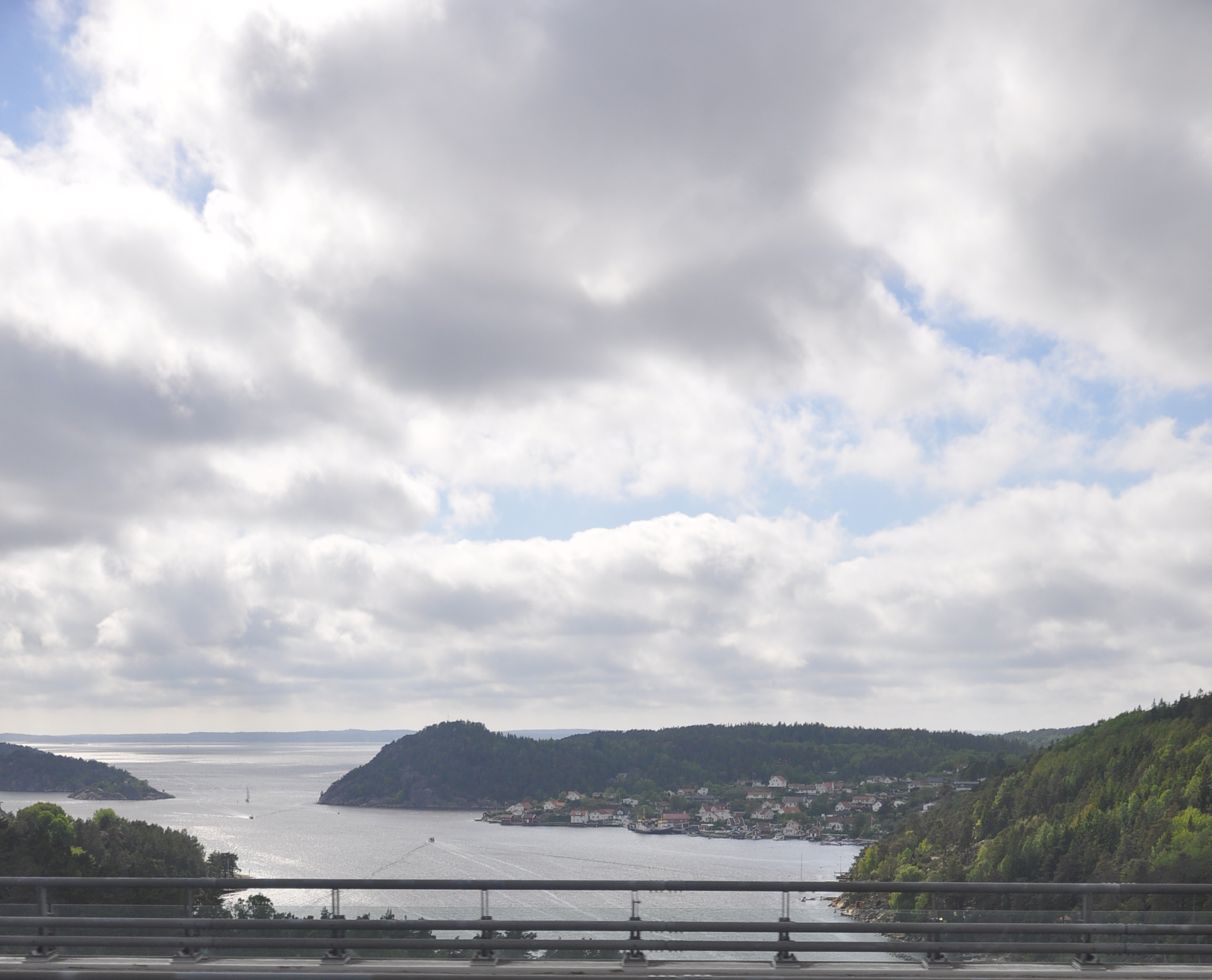 Sponvika og Iddefjorden sett frå Svinesundsbrua på veg nordover. Noreg og Halden kommune på høgre side, Sverige og Strömstad kommun på venstre side.